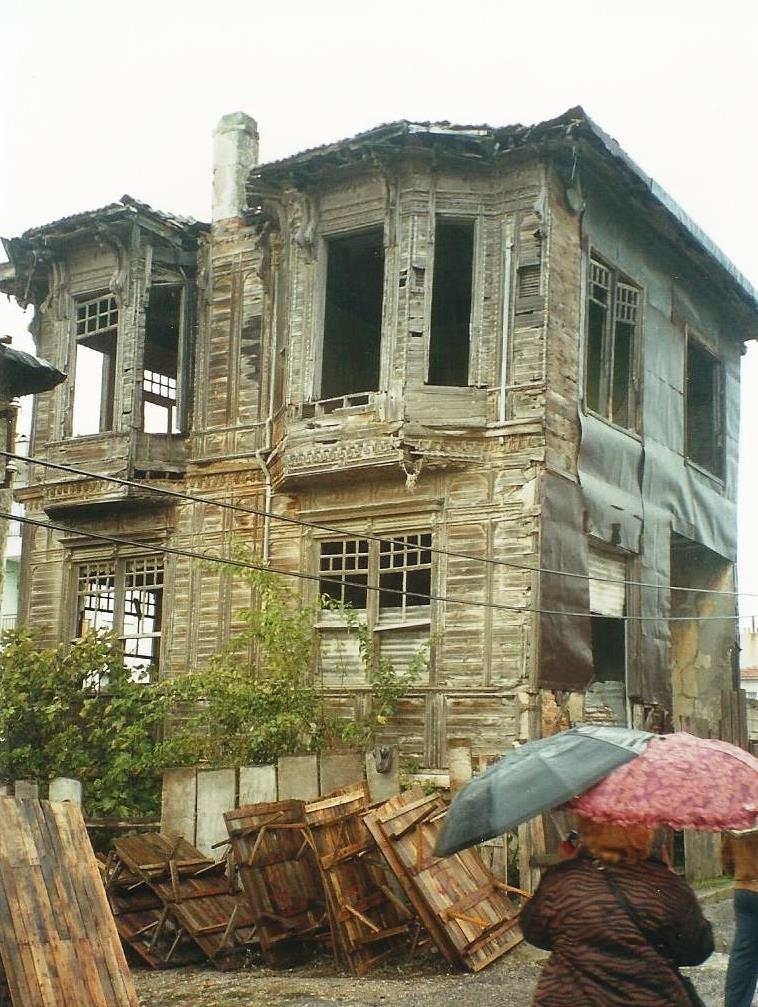 old greek house in nowadays Celaliye